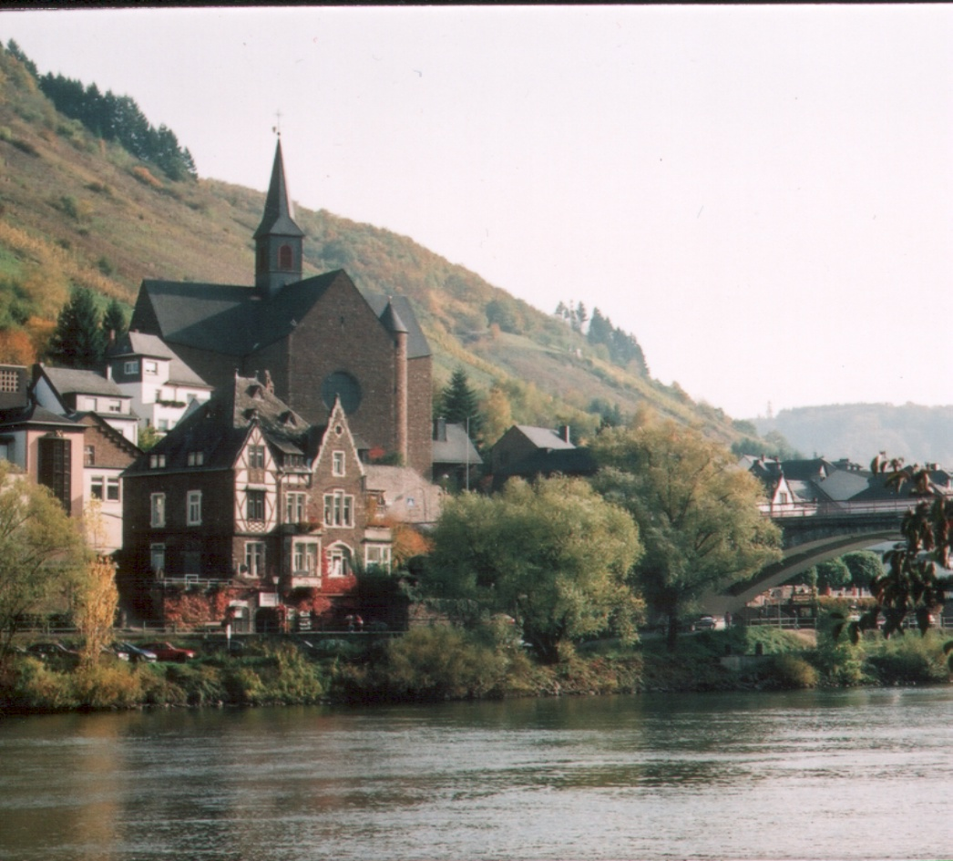 Katholische Kirche Cochem-Cond an der Mosel (1964-1968), Architekt Dr. Emil Steffann